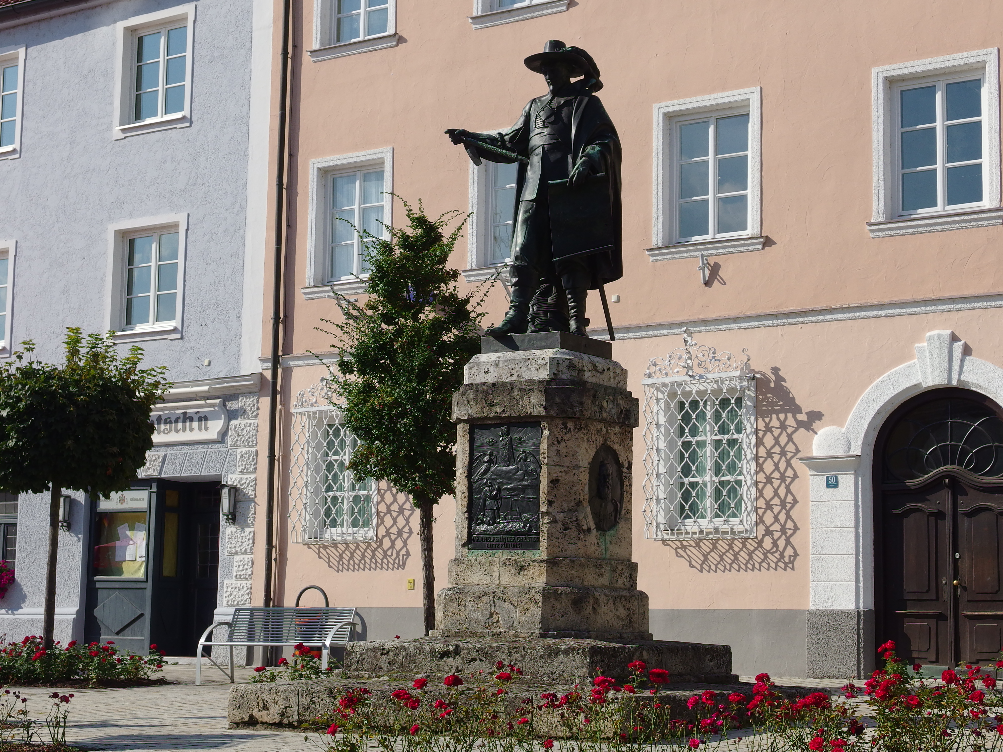 Denkmal auf zweifach gestuftem Postament, zeigend die Figur des Feldherrn Tilly, von 1914, von Hygin Keine nach einem Entwurf von Anton KaindlThis is a photograph of an architectural monument.